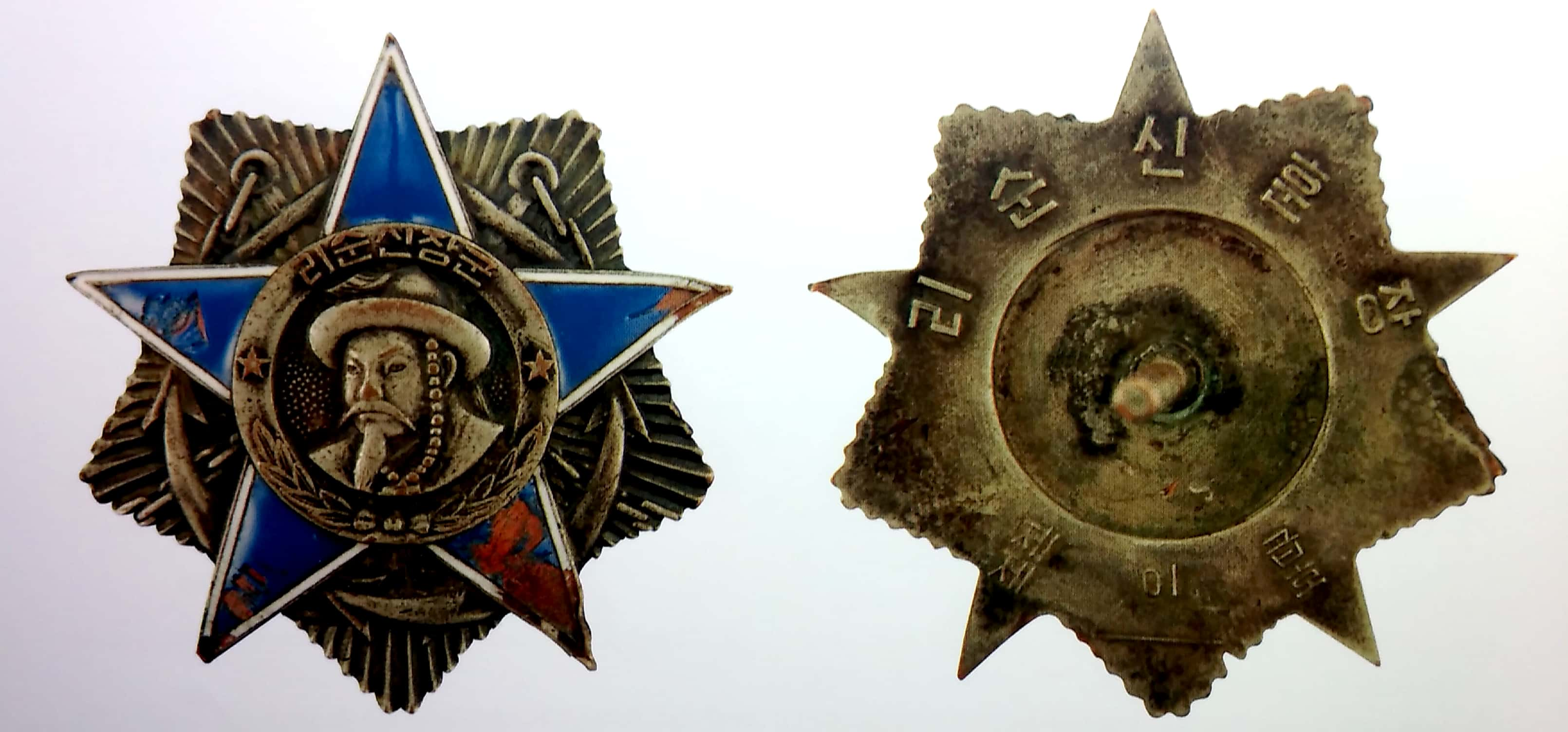 Order of Lee Shun Shin 2nd class